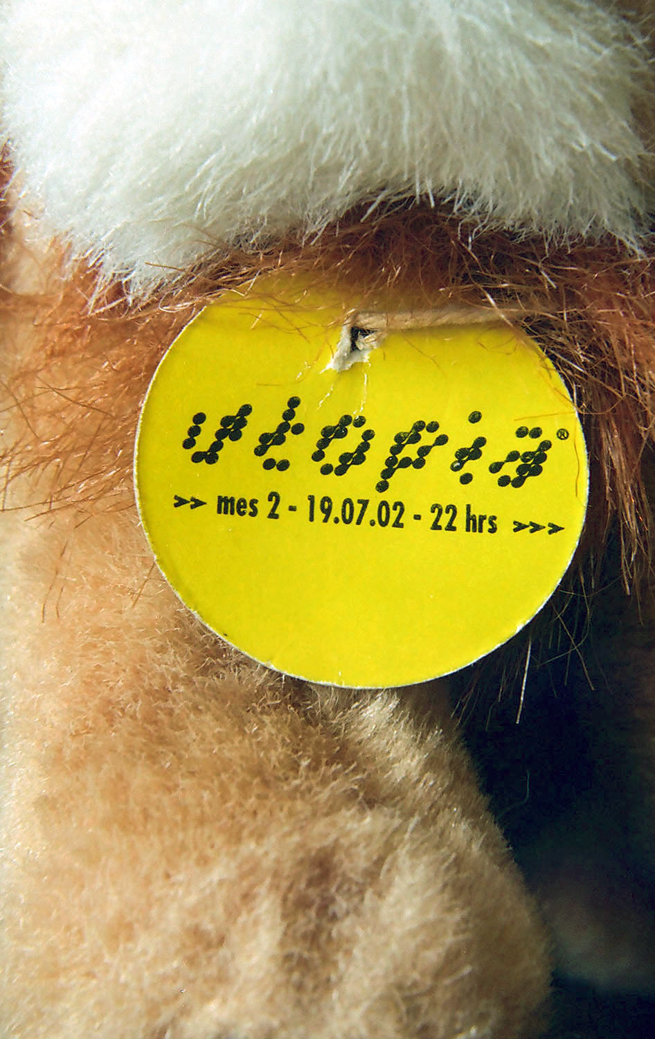 Pin de Utopía